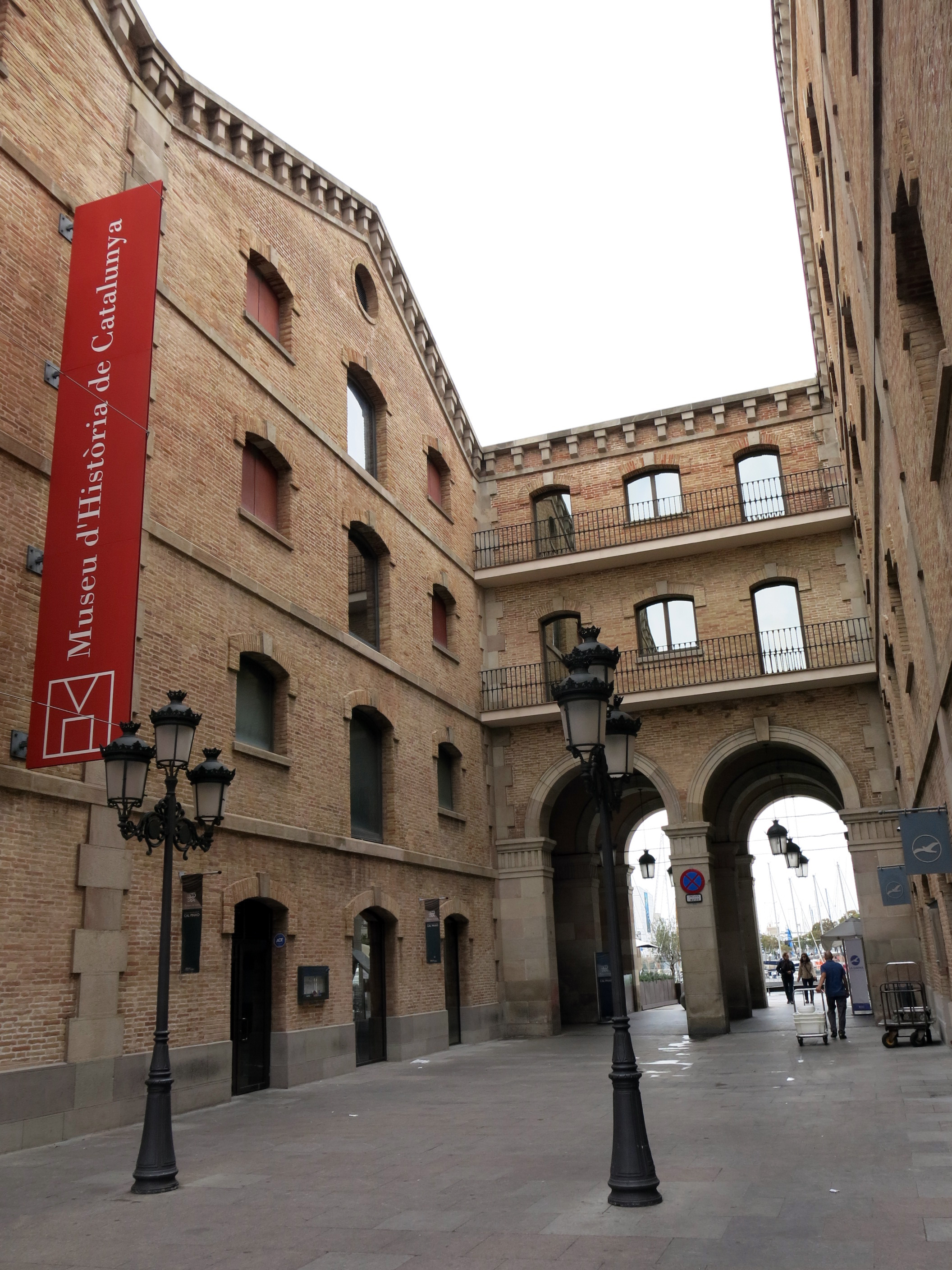 Magatzems generals del Dipòsit (Barcelona). Inclouen el Museu d'Història de Catalunya